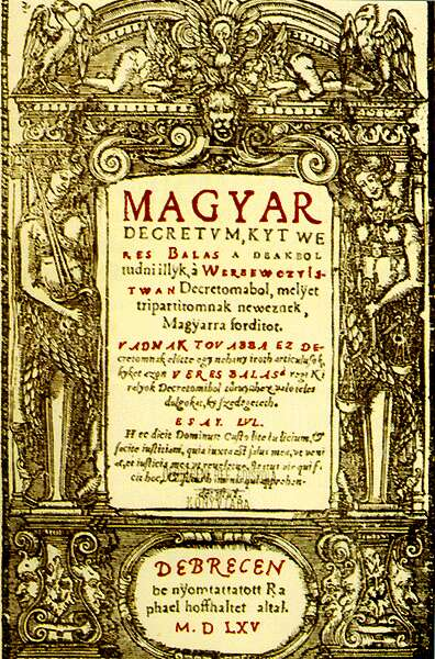 Werbőczy István Tripartitumának magyar kiadása, Debrecen, 1565.